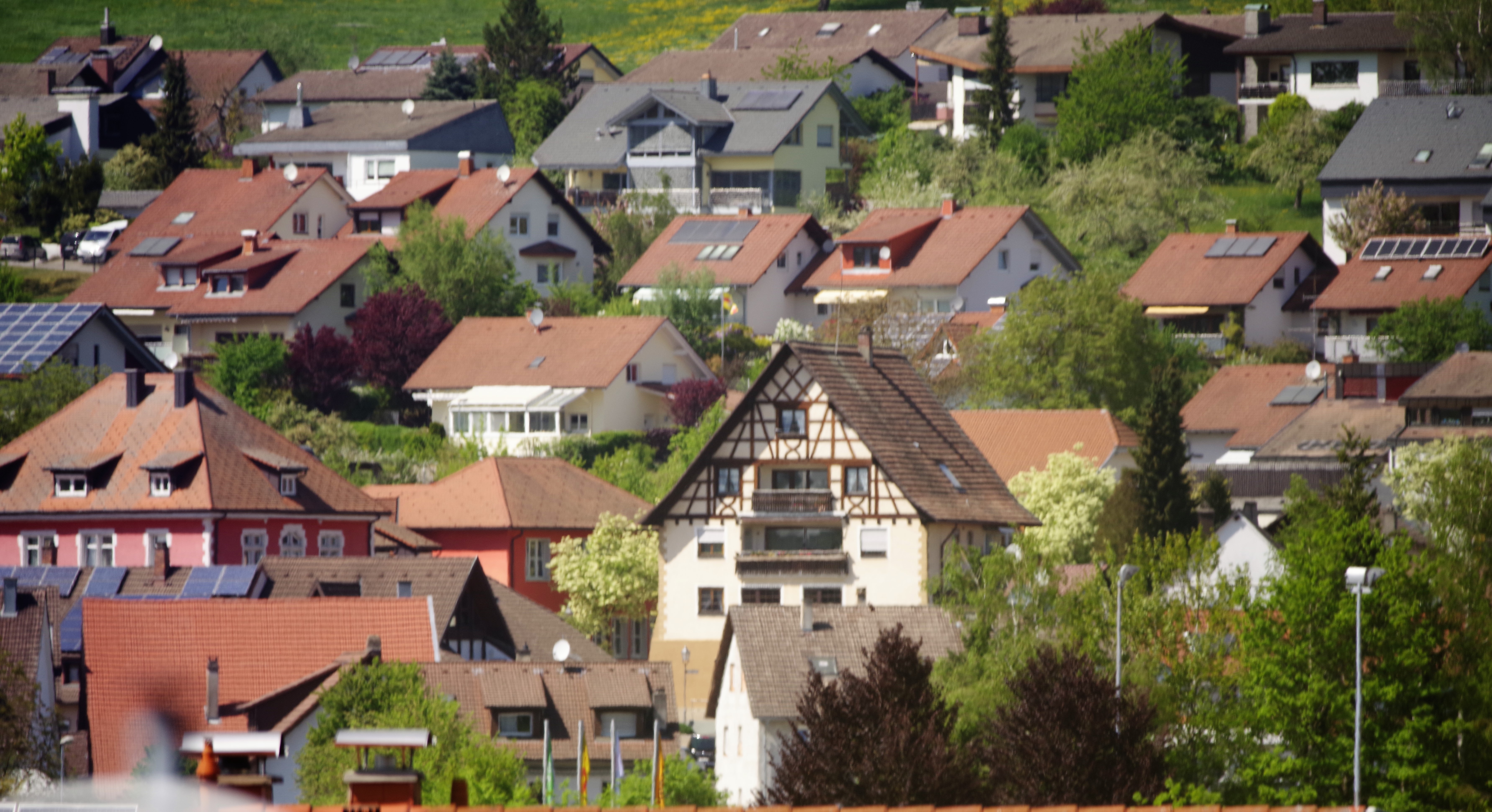 Blick auf Horheim mit (links) ehem. Schulhaus und einst Stühlinger Amtshaus